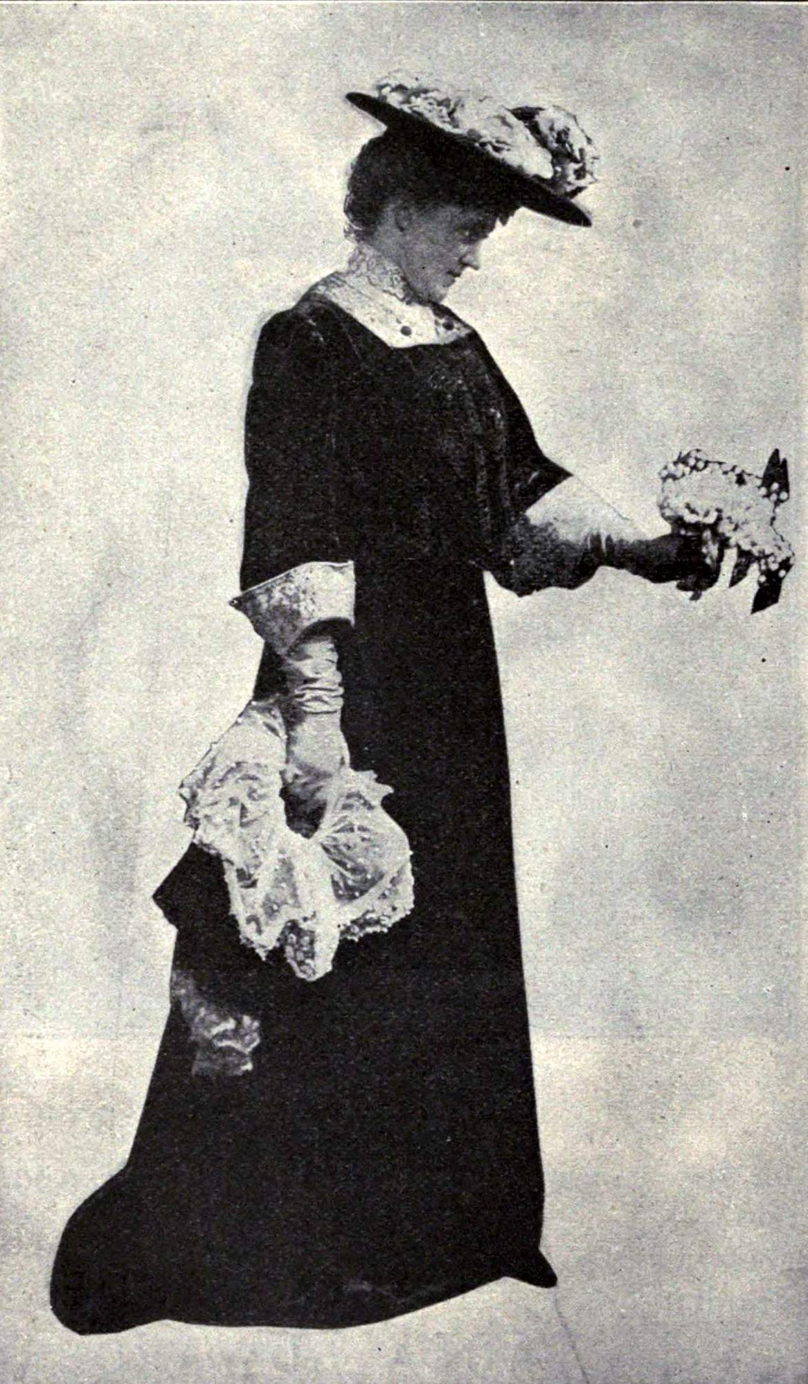 Minnie Dupree